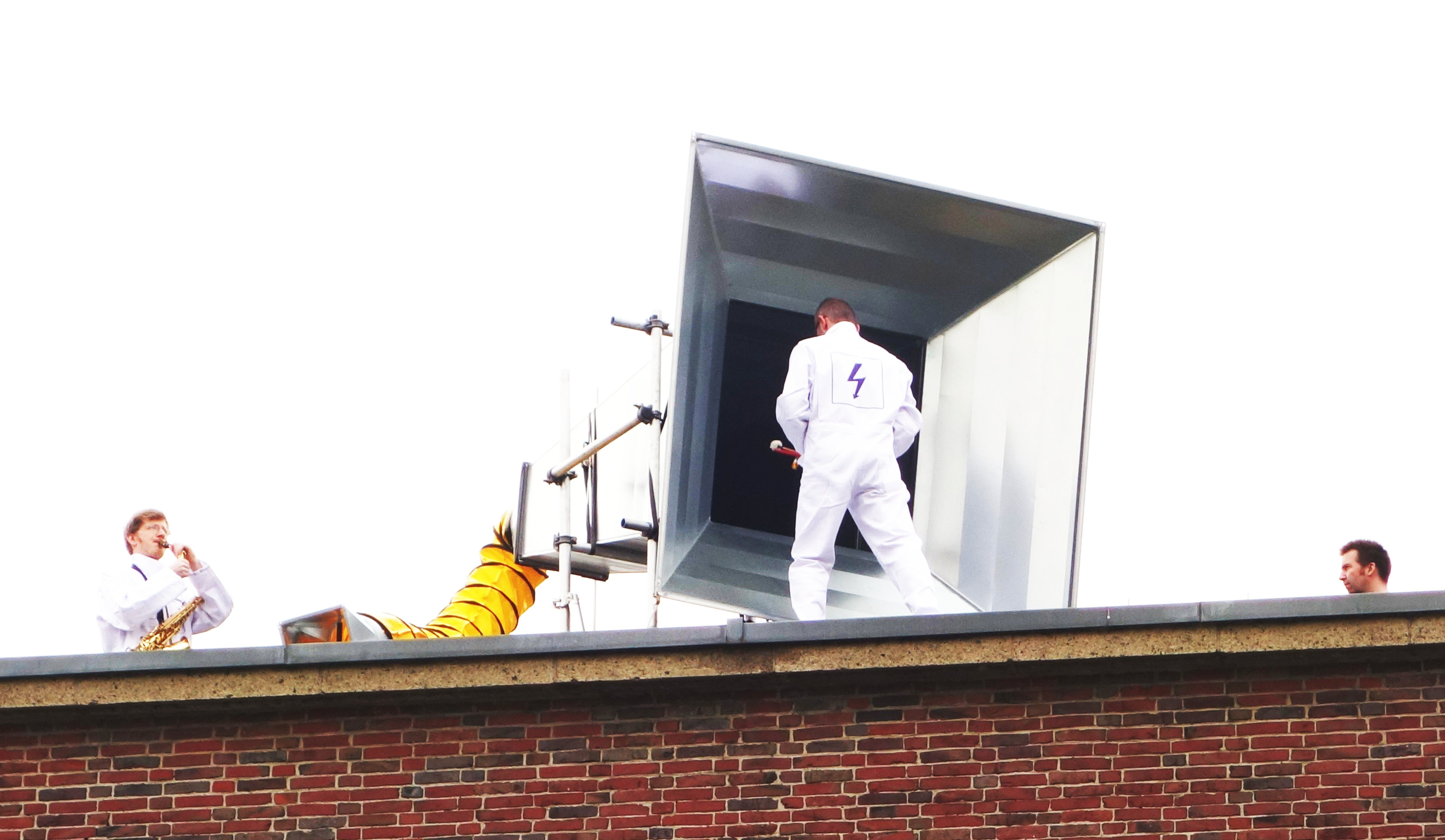 Düsseldorf, Ehrenhof. "Quadraphone". Klanginstallation anlässlich der Quadriennale 2014. An 11 Ausstellungsorten. "Fanfara Futurista" von Rochus Aust. Zusätzlich ist die Komposition über 35 Mini-Quadrophone zu hören, die Aust in Kanalschächten der Stadt installiert hat.